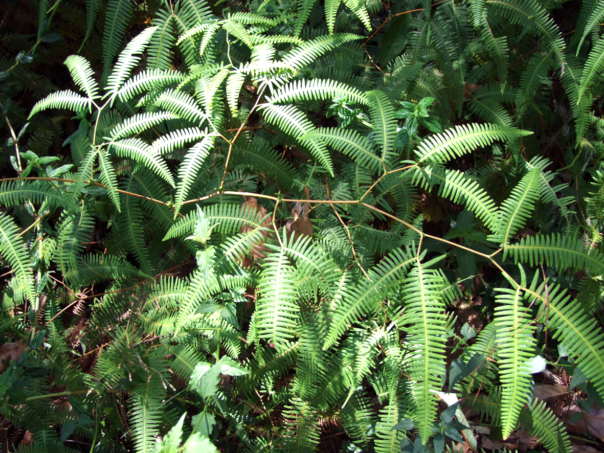 Gleichenella pectinata (Gleicheniales: Gleiceniaceae)